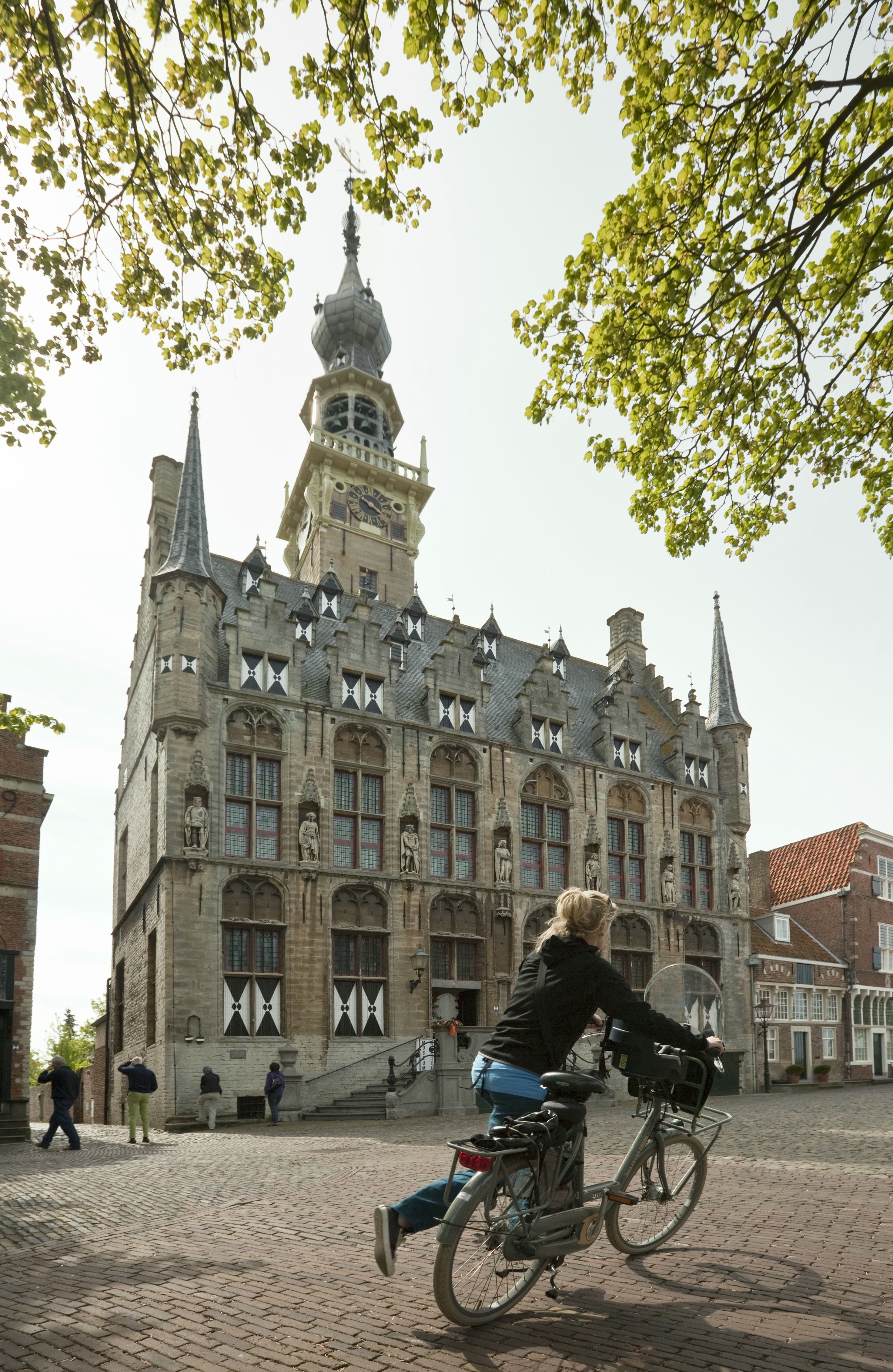 Stadhuis: Overzicht voorgevel